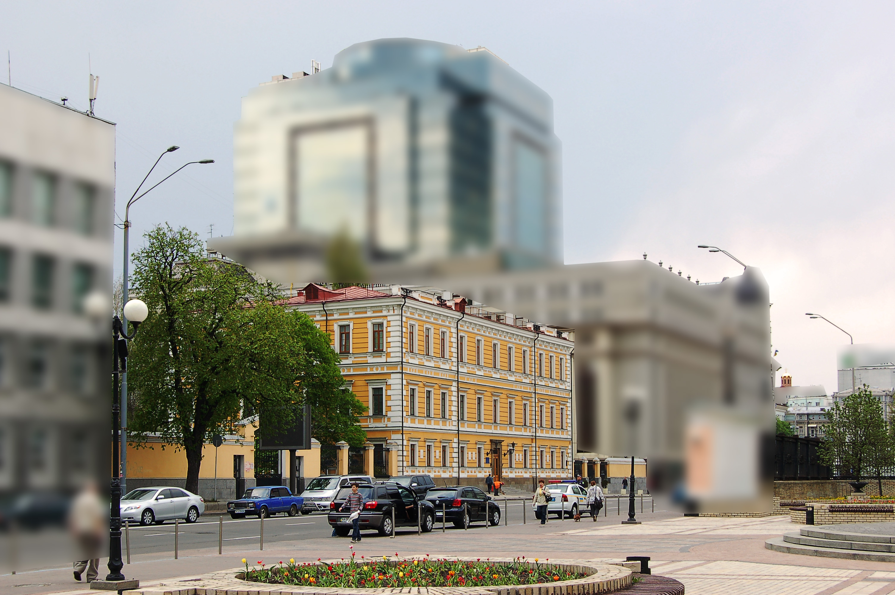 Будівля Президії Національної академії наук України (будинок № 54 по Володимирській вулиці у Києві)